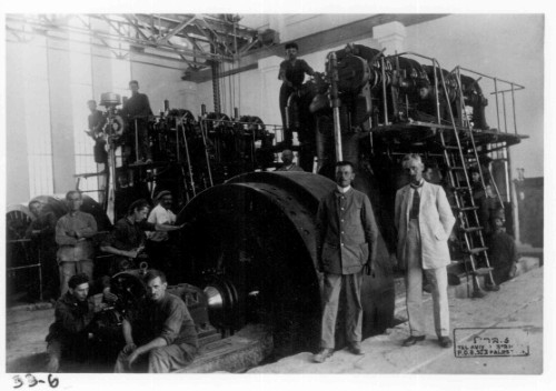 הדיזל גנרטור של תחנת הכח הראשונה בתל אביב